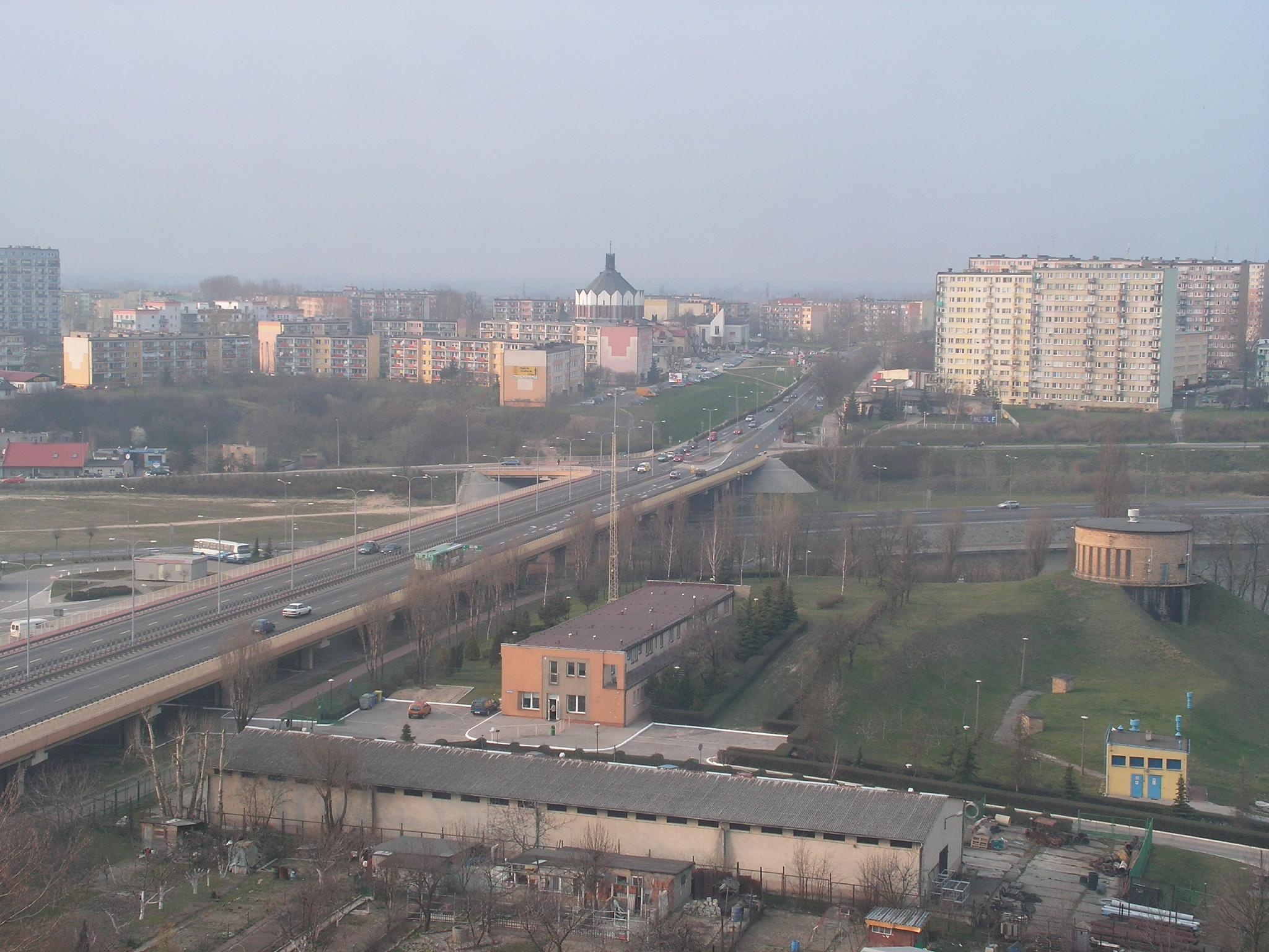 Winiary (dzielnica Gniezna)